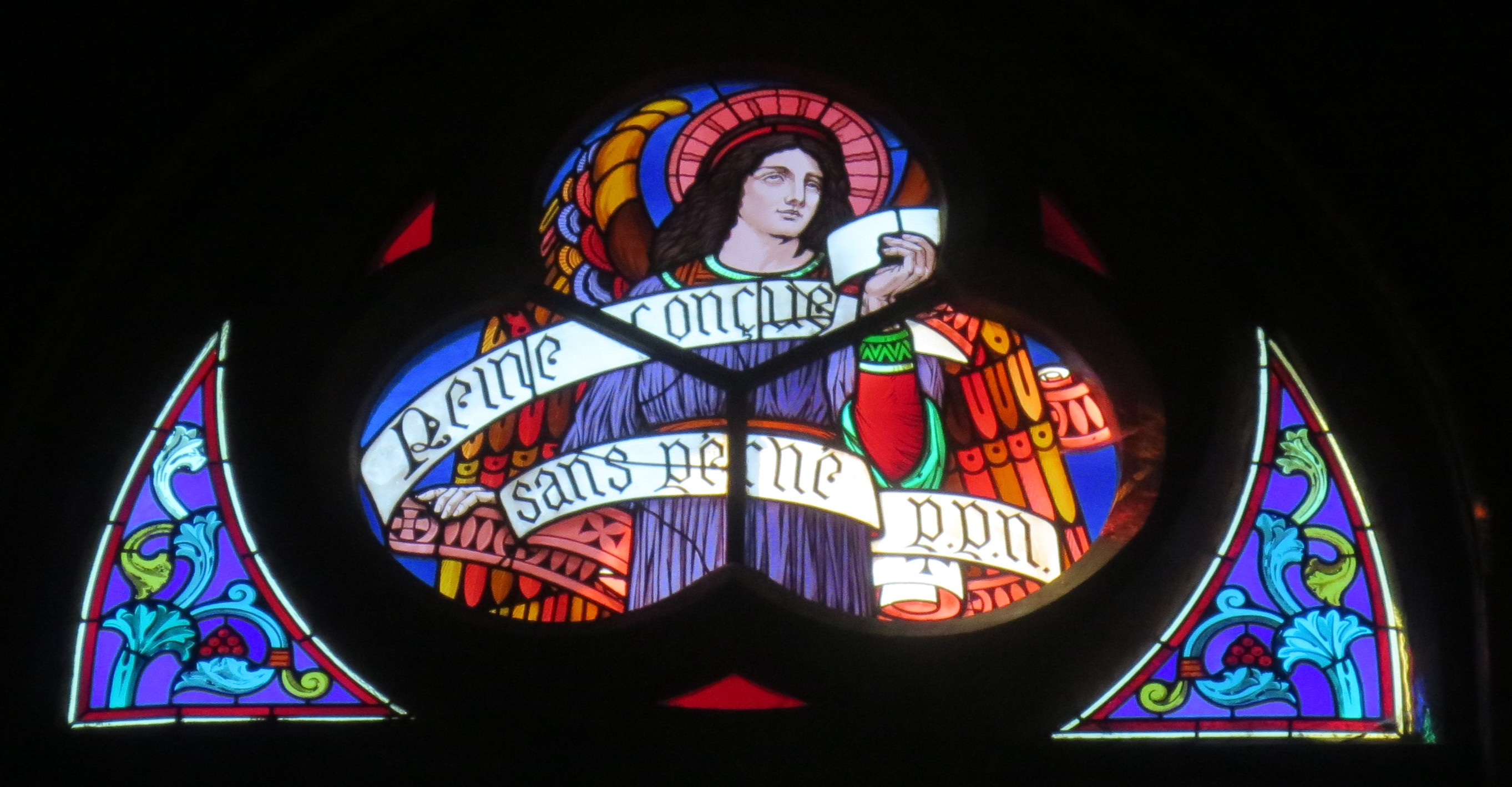 de Fleurbaix.